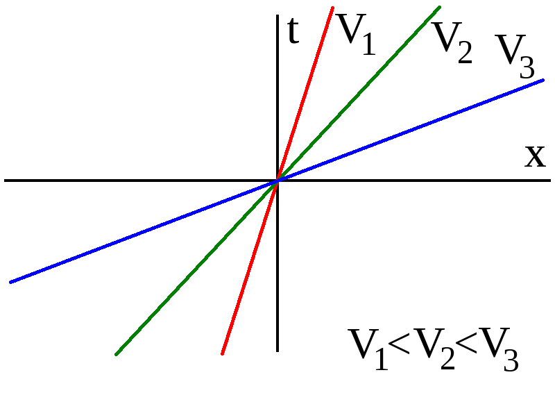 Mondolinioj de diversaj rapidoj